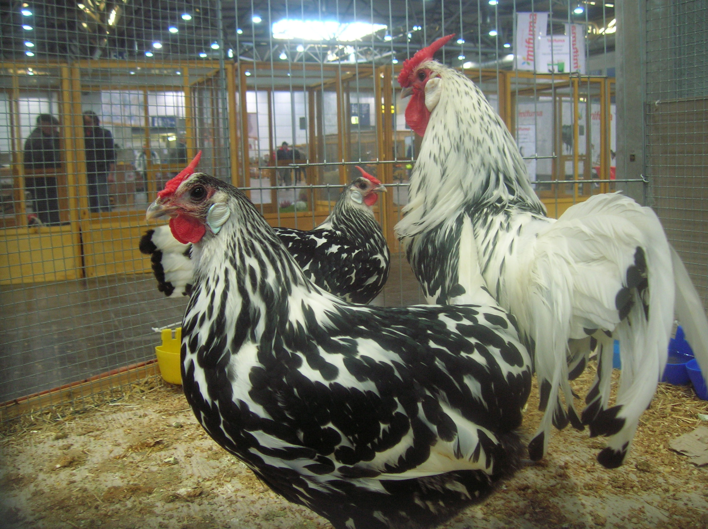 Hamburger Hühner, Silberlack, Lipsiaschau 2015.